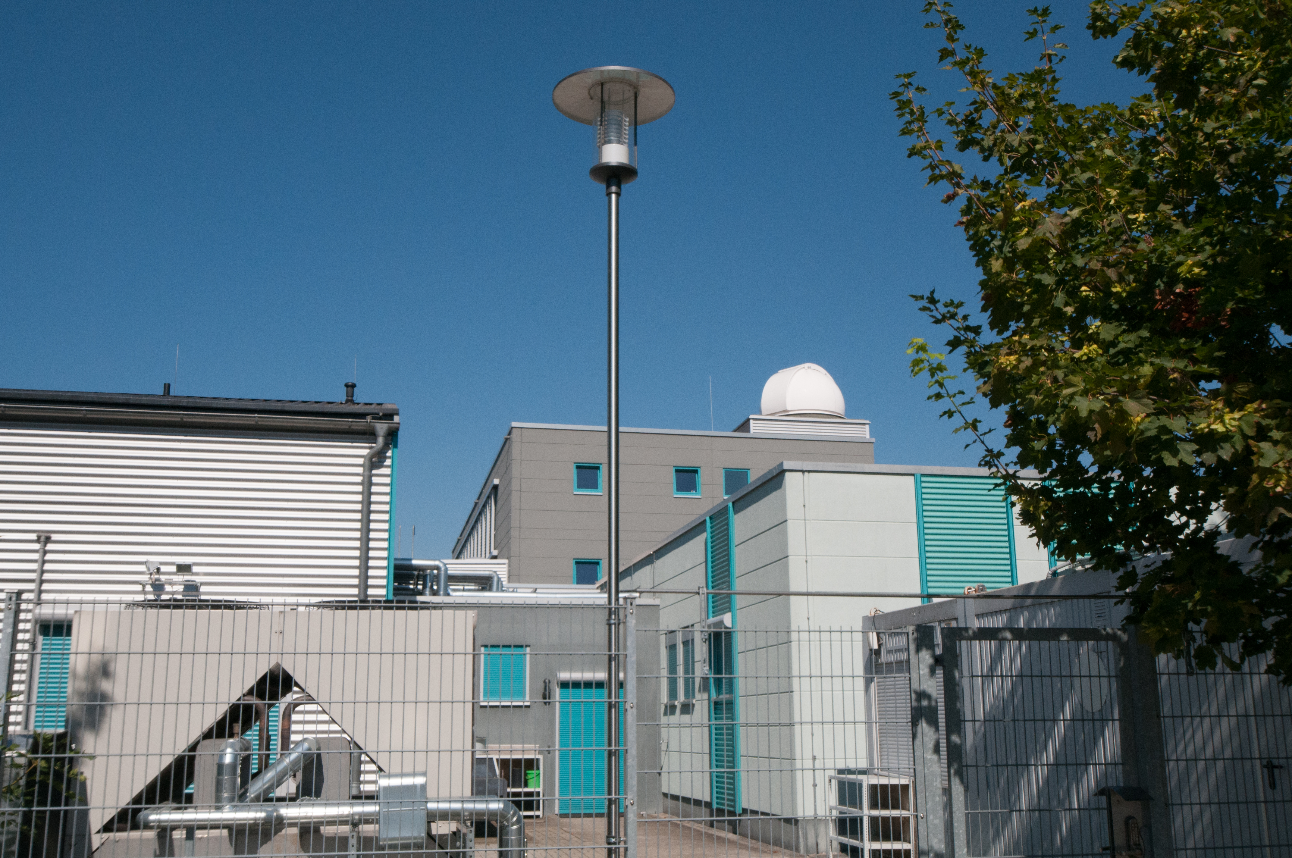 Gemeinde Mellingen in Thüringen